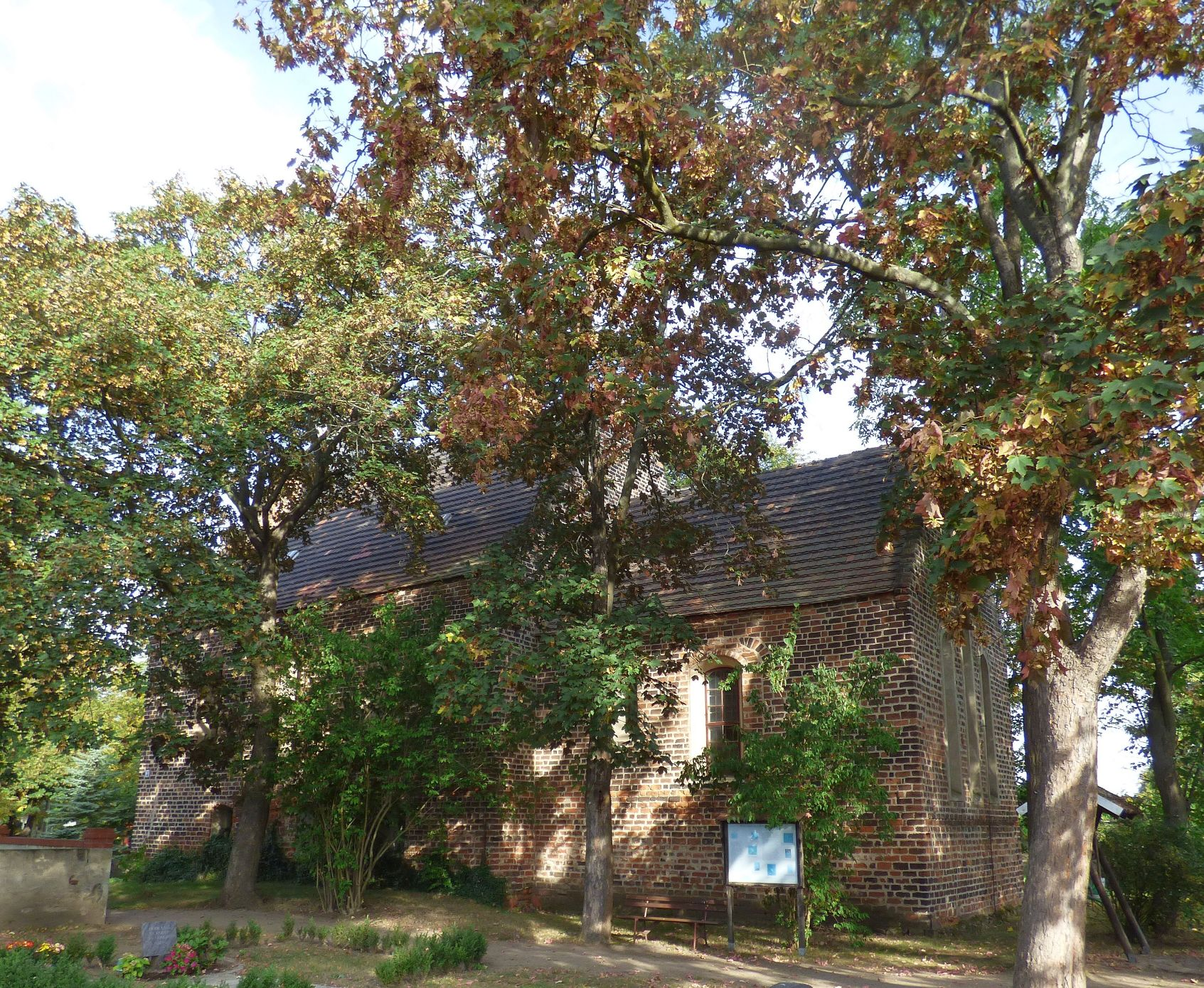 Südseite der Dorfkirche Burxdorf